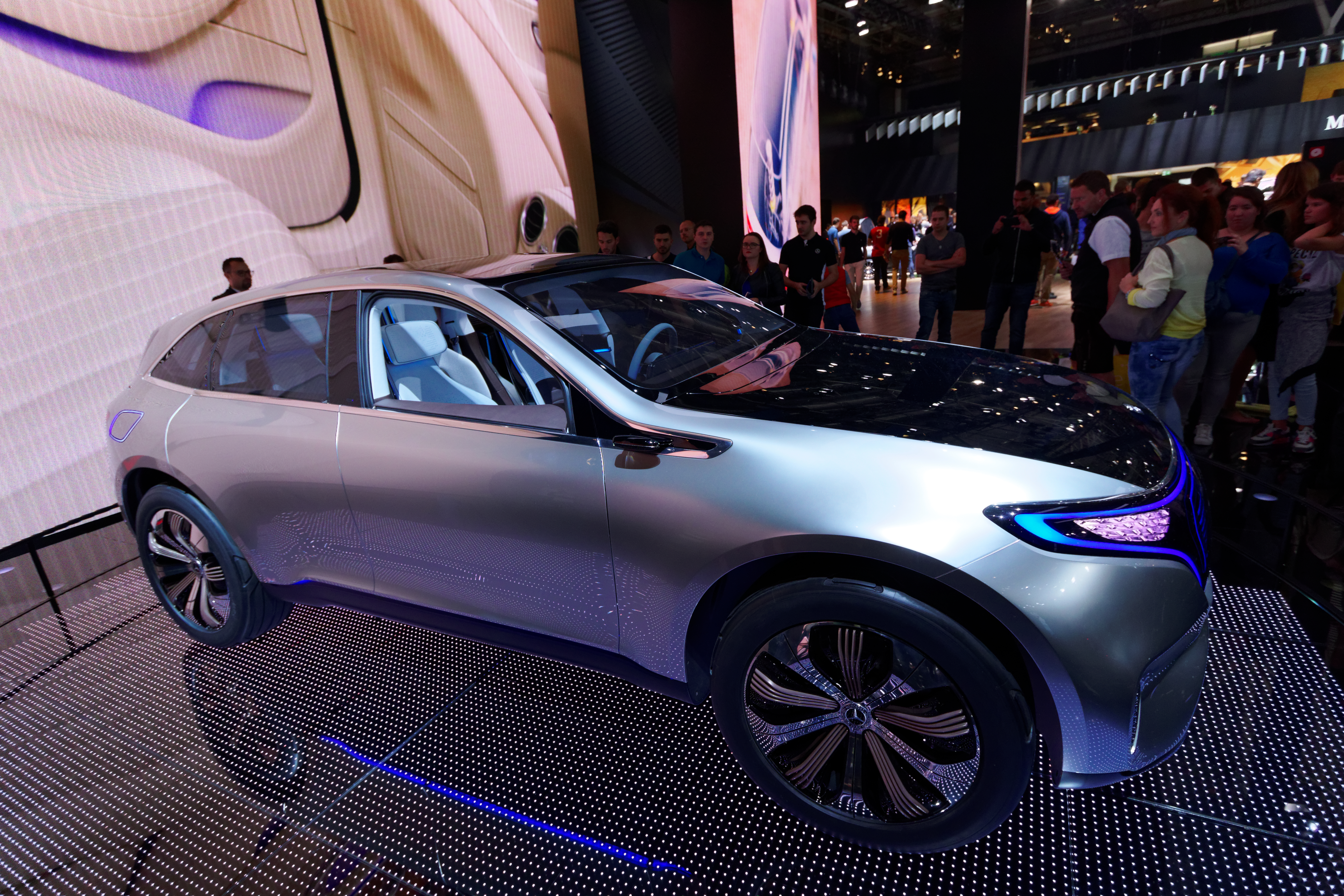 Une Mercedes Generation EQ présentée lors du mondial de l'automobile de Paris 2016.